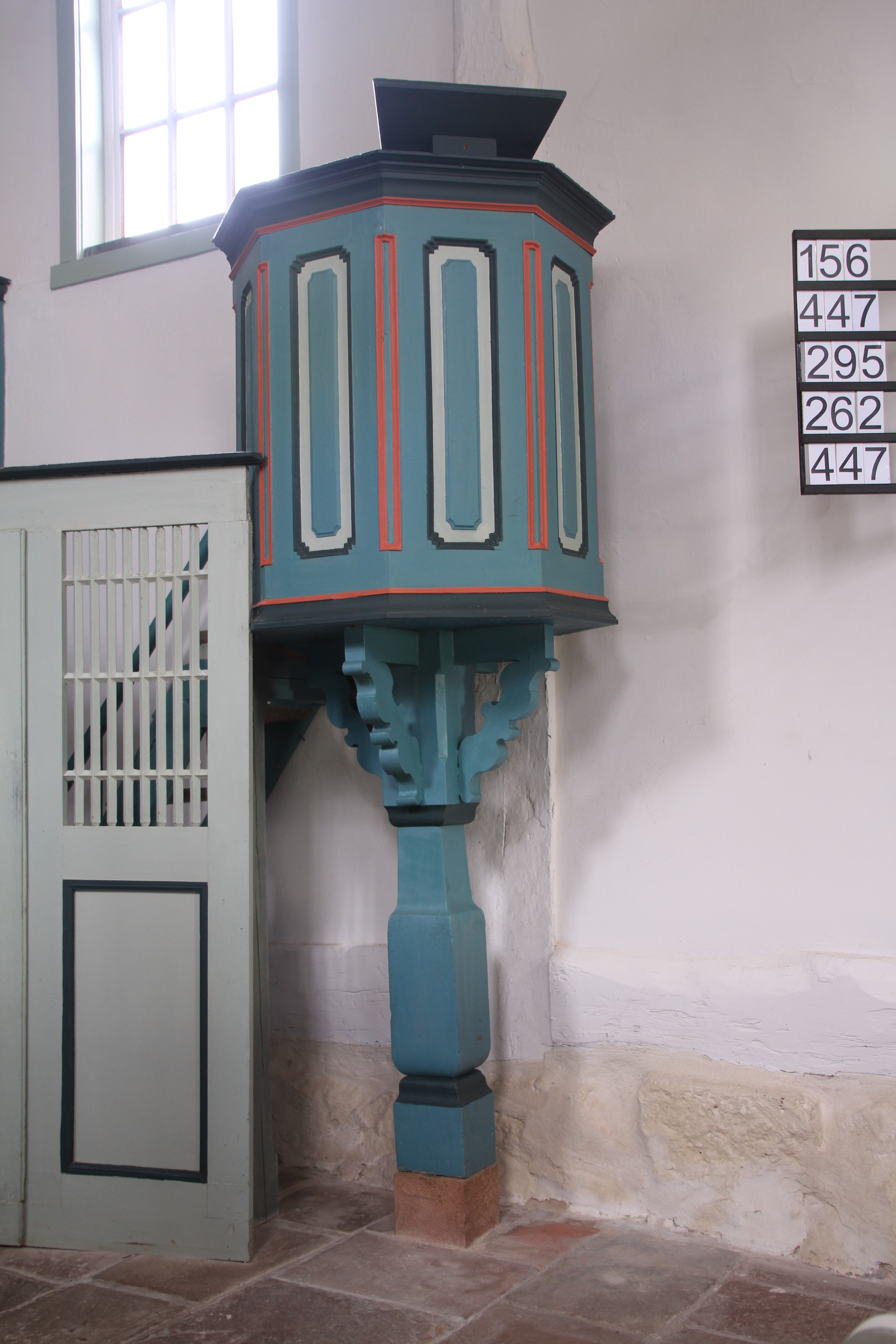 Siehe Bild und Dateiname